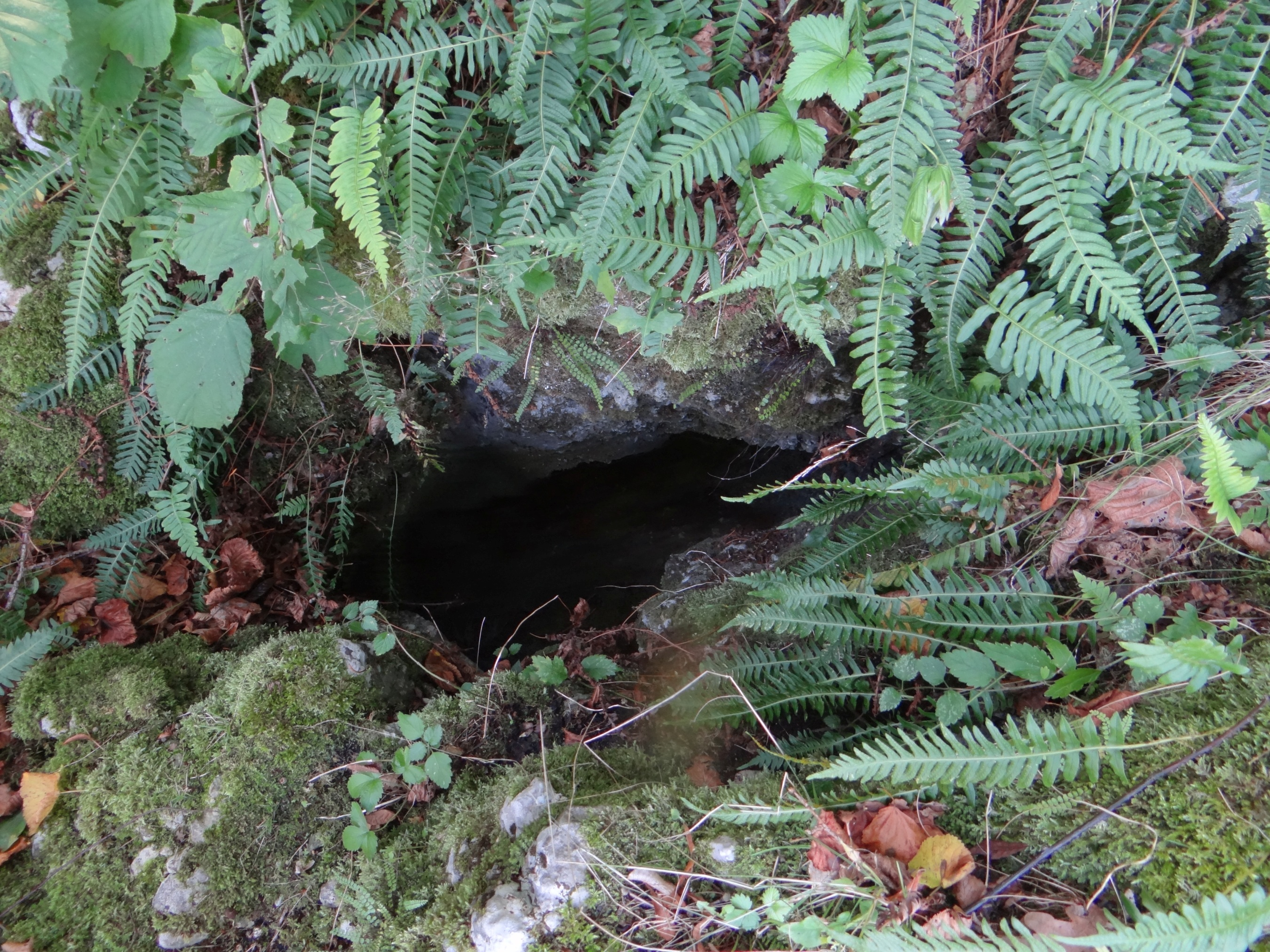 Studnia za Igłą w Skale Gaudynowskiej w dolinie Brodłówki. Otwór górny